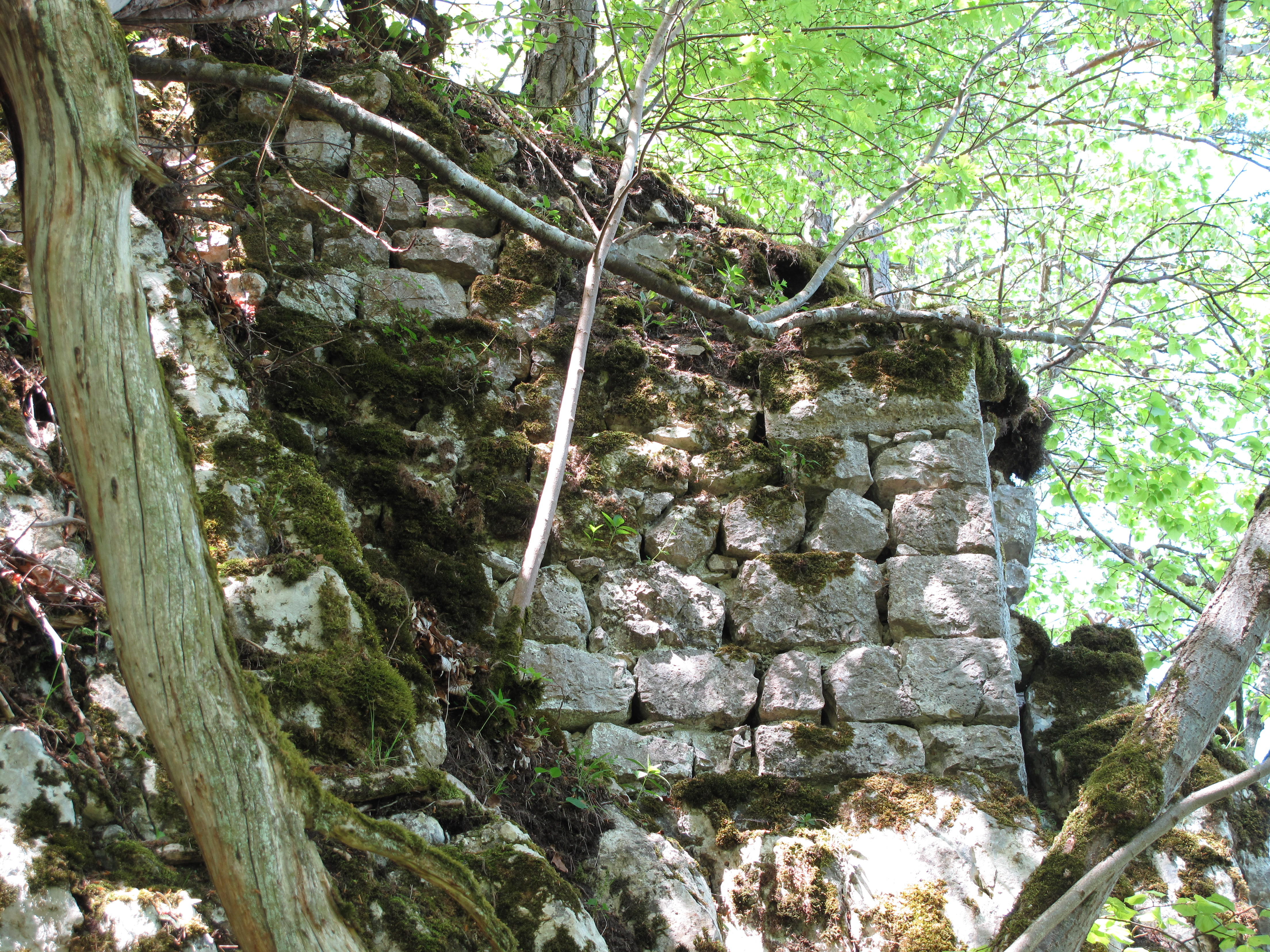 Reste der südöstlichen Mauerecke des Donjon mit Buckelquader.